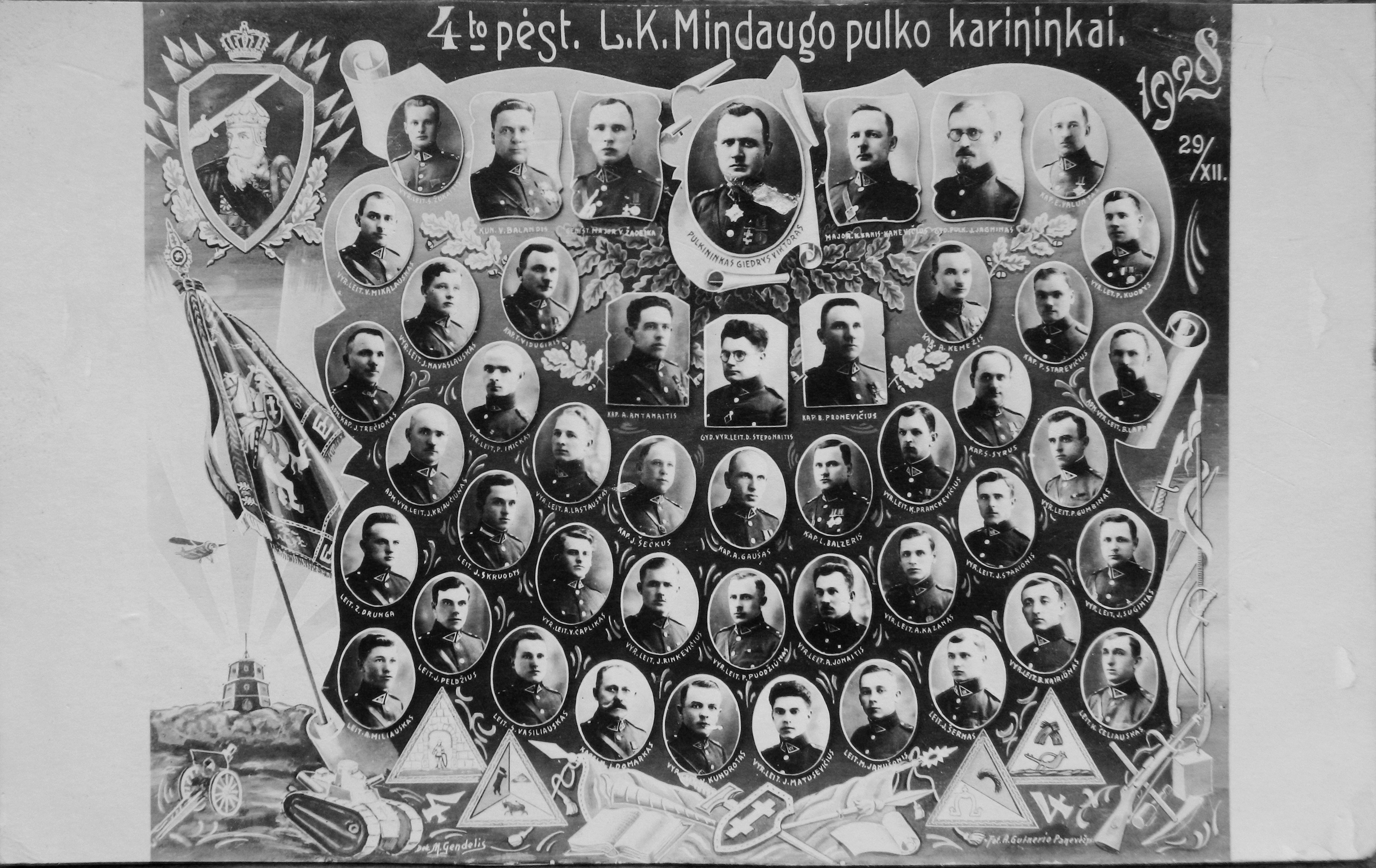 4-to pėstininkų L.K. Mindaugo pulko karininkai, 1928-12-29.